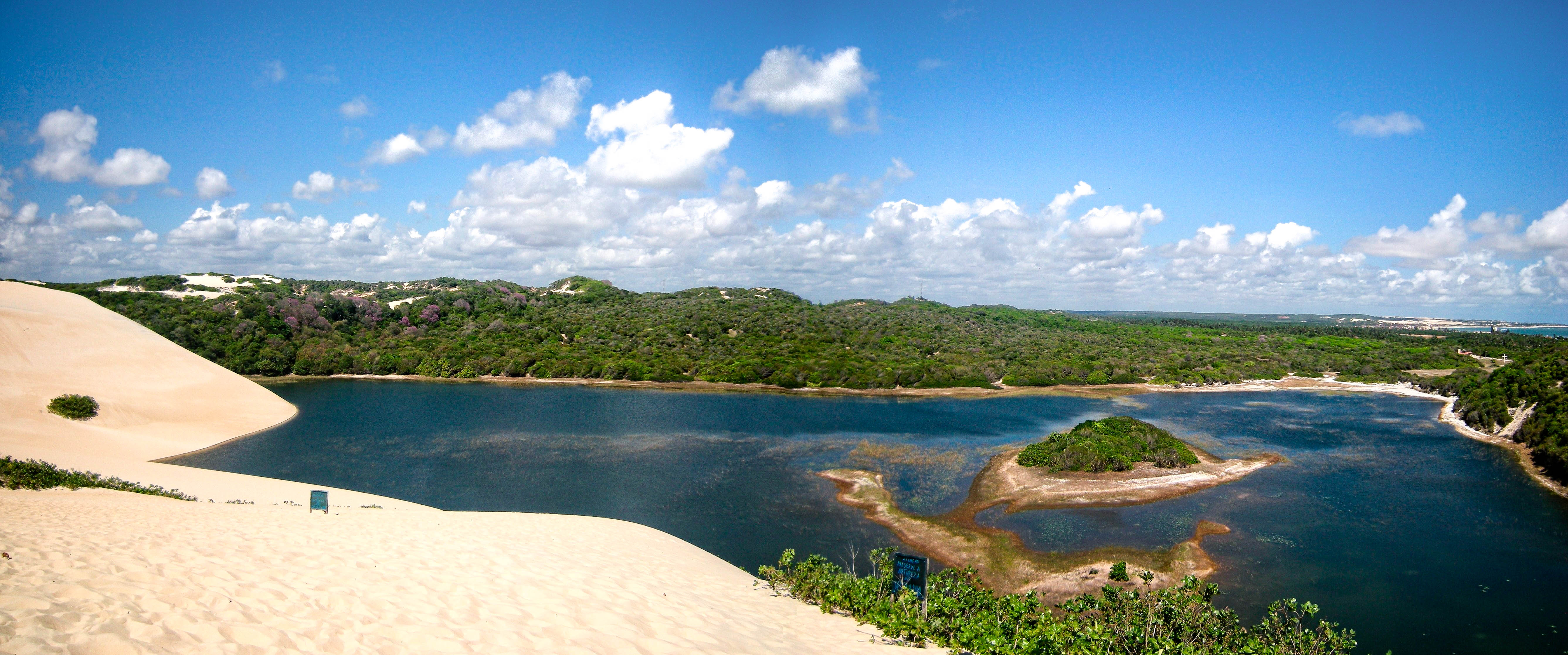 Genipabu lagoon. Natal (RN), Brazil.